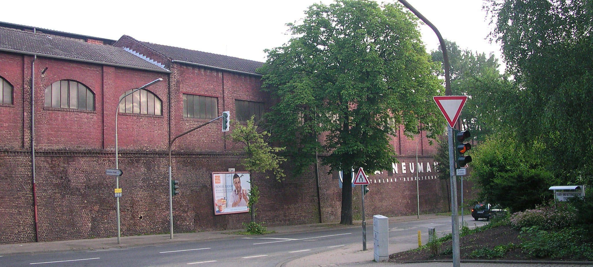 Eschweiler, Fa. F.A. Neumann auf ehemaligem Hoesch-Gelände